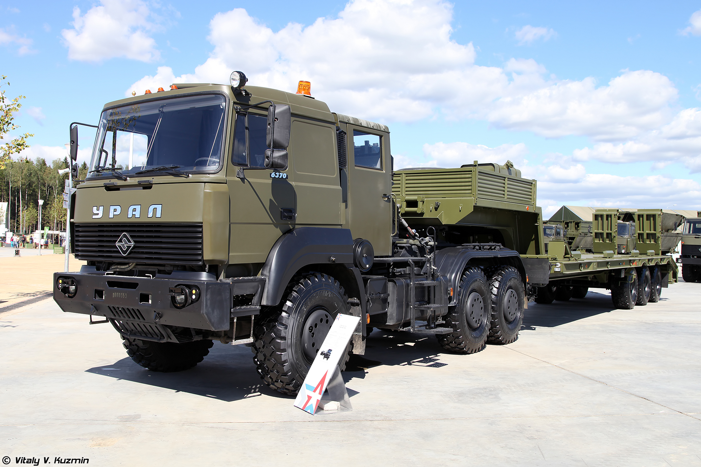 Седельный тягач Урал-63704 (Ural-63704 truck)